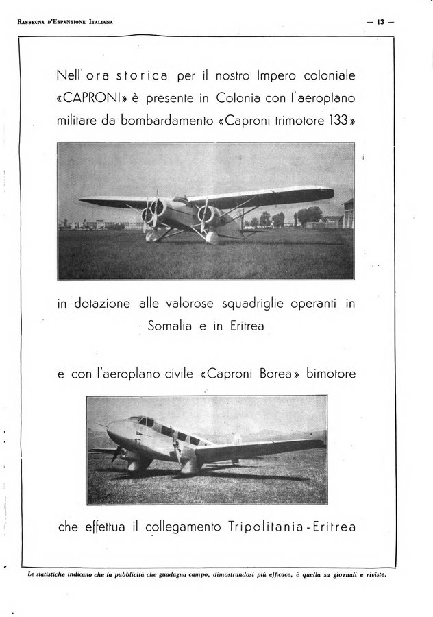 Pagina pubblicitaria della Società Caproni del 1936 mostrante un Caproni 133 e un Caproni Borea; tratto da L'Illustrazione Coloniale, 1936.